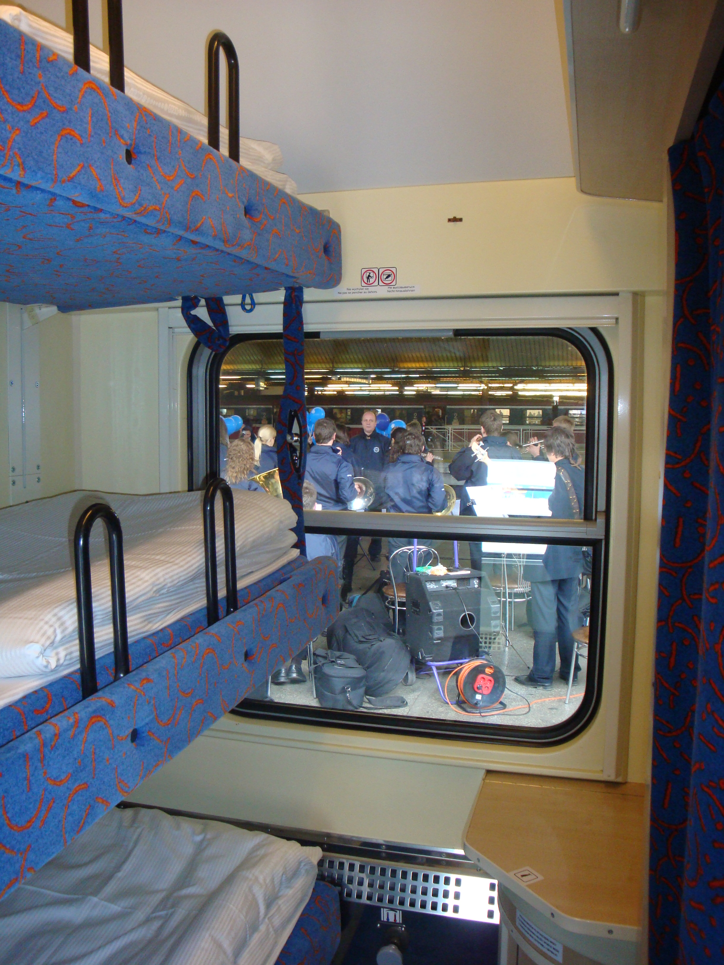 Przedział sypialny w 3-miejscowej aranżacji.